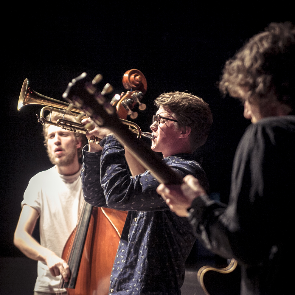 Jakob Sørensen og Elliott. Foto: Simon Skipper